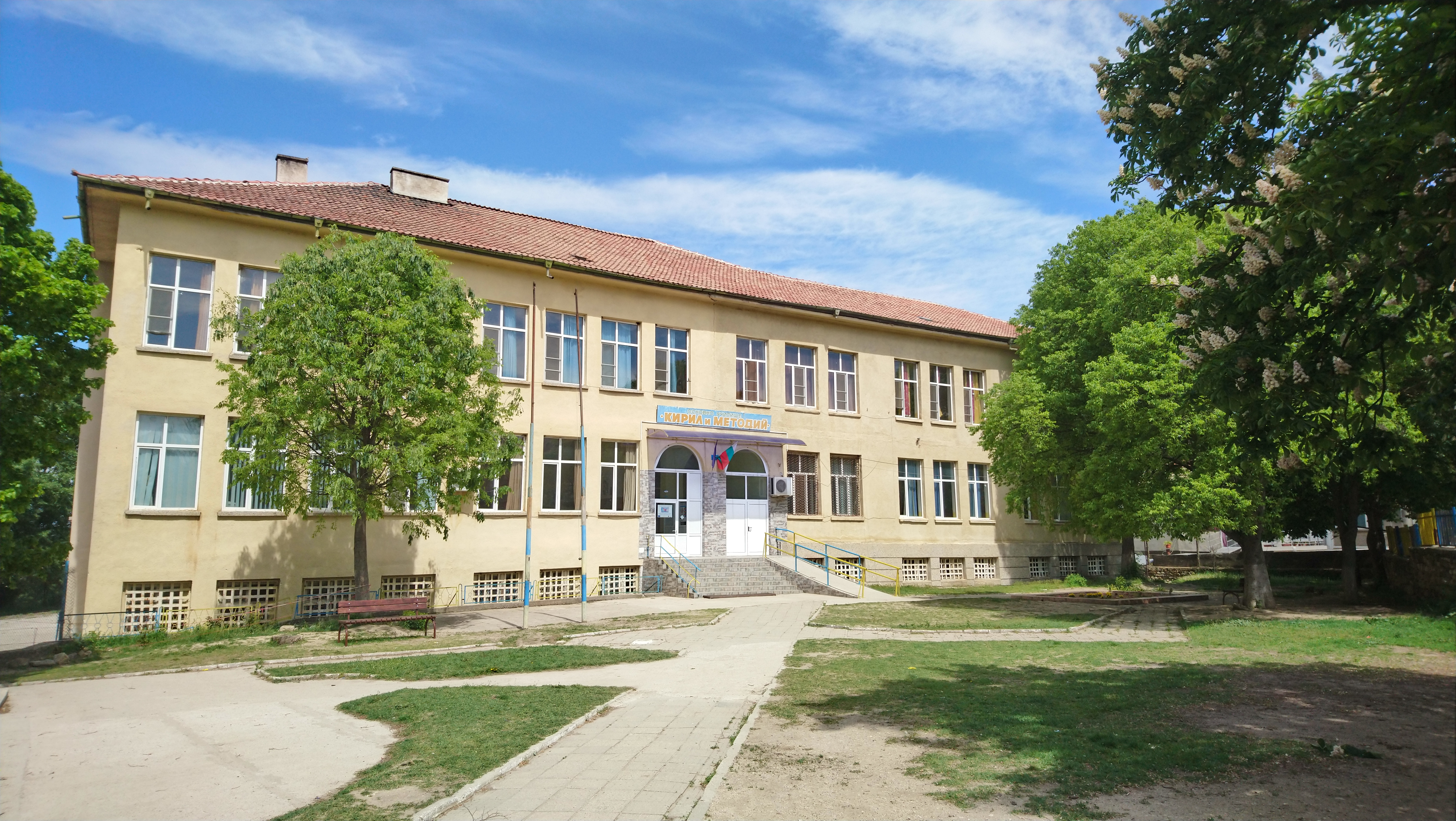 Основно училище Кирил и Методий в село Марикостиново